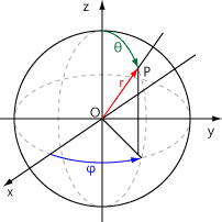 구면좌표계